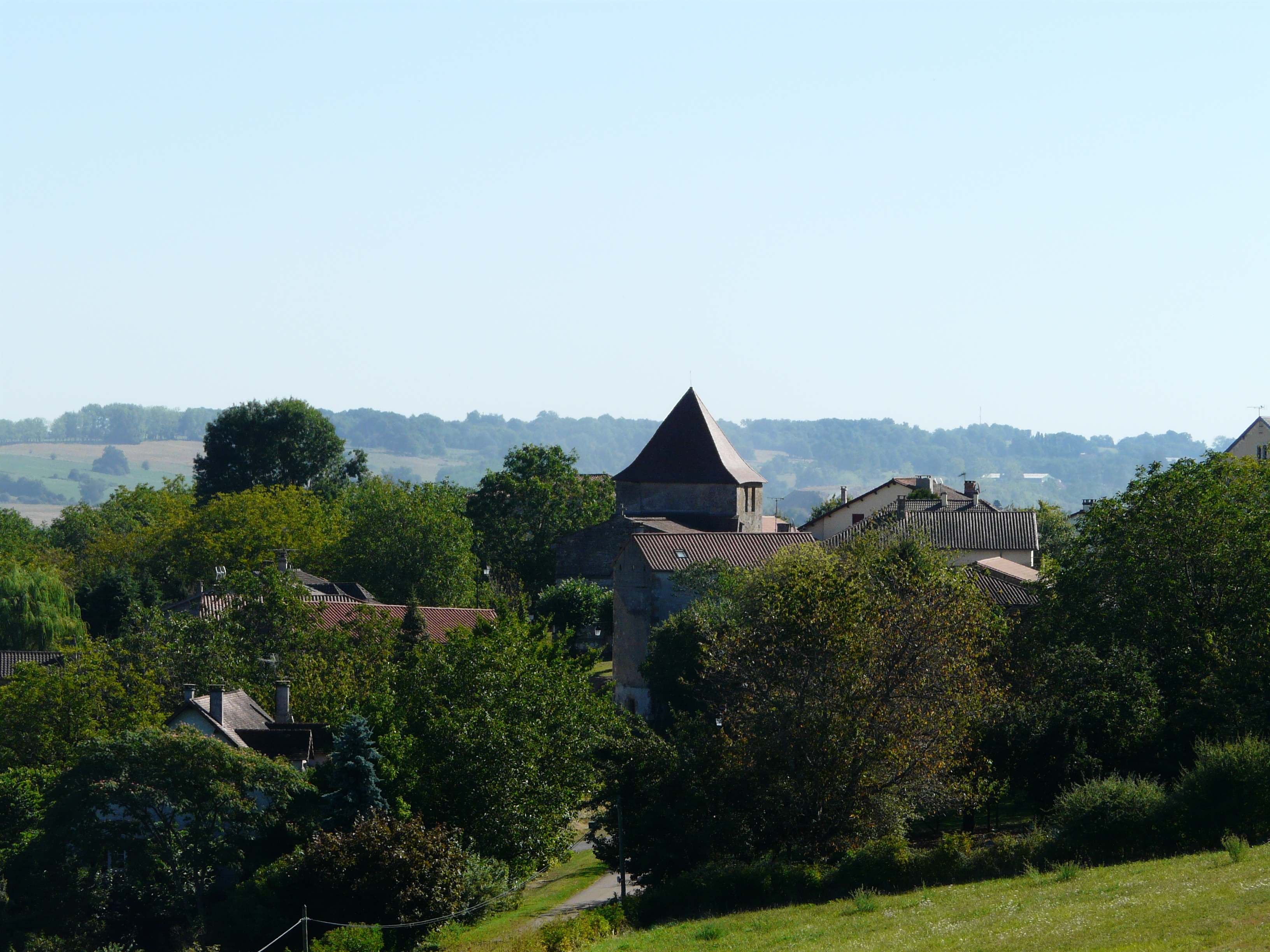 Le village de Saint-Romain, Saint-Romain-et-Saint-Clément, Dordogne, France.